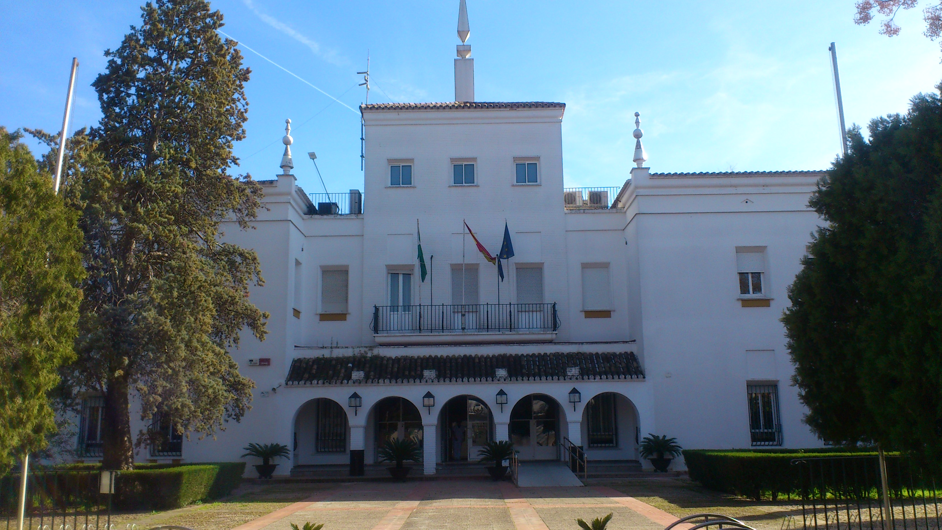 Fachada de la sede de AGAPA (Agencia de Gestión Agraria y Pesquera de Andalucía